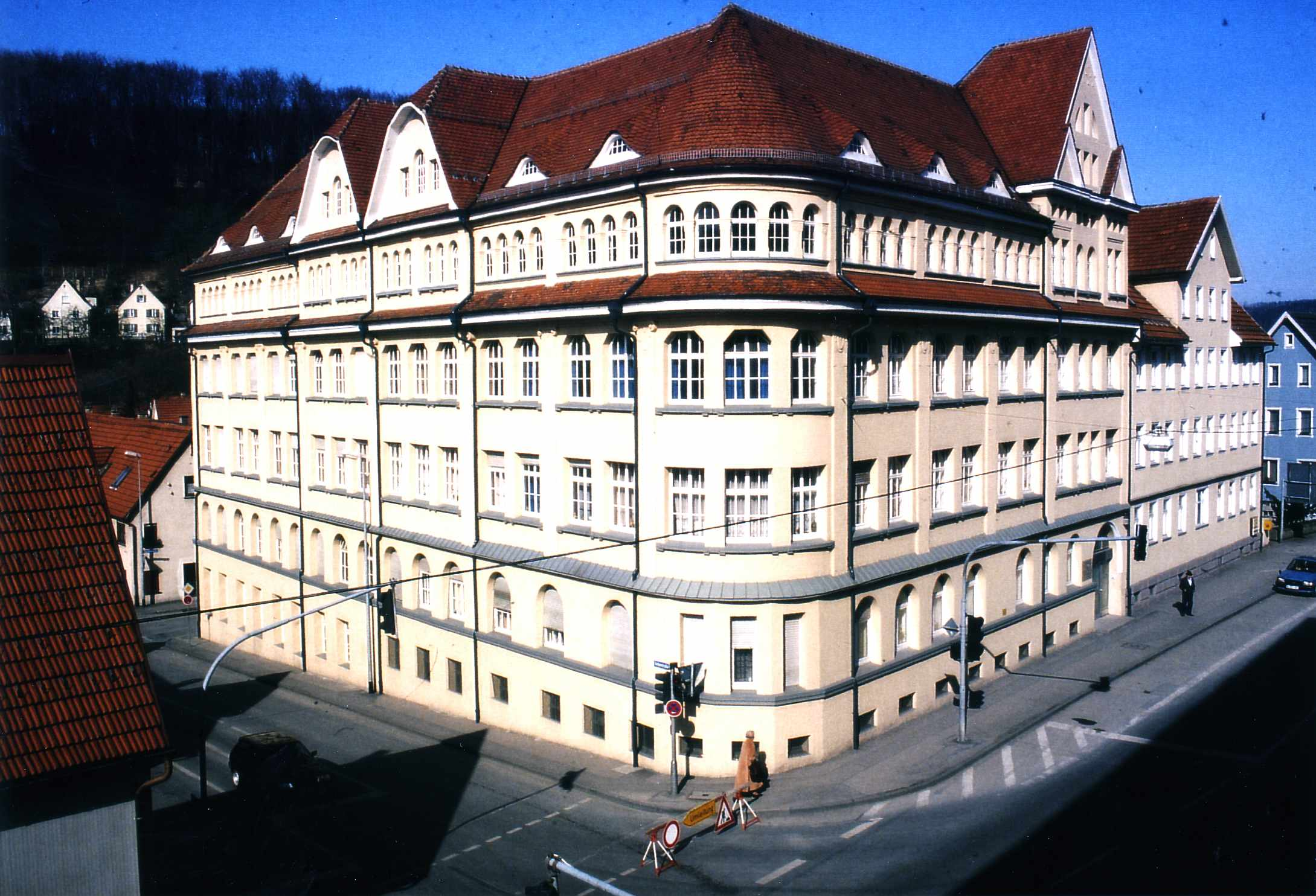 Jugendstil-Fabrikbau Balthas Blickles Witwe in Albstadt Tailfingen